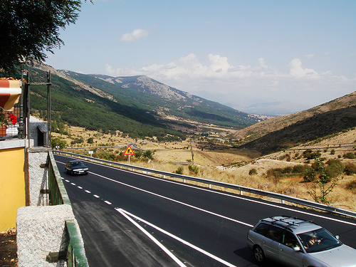 Puerto de la Cruz Verde. Sierra de Guadarrama. Community of Madrid, Spain